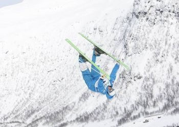 Александр Смышляев на этапе Кубке Мира по могулу Ruka 2013